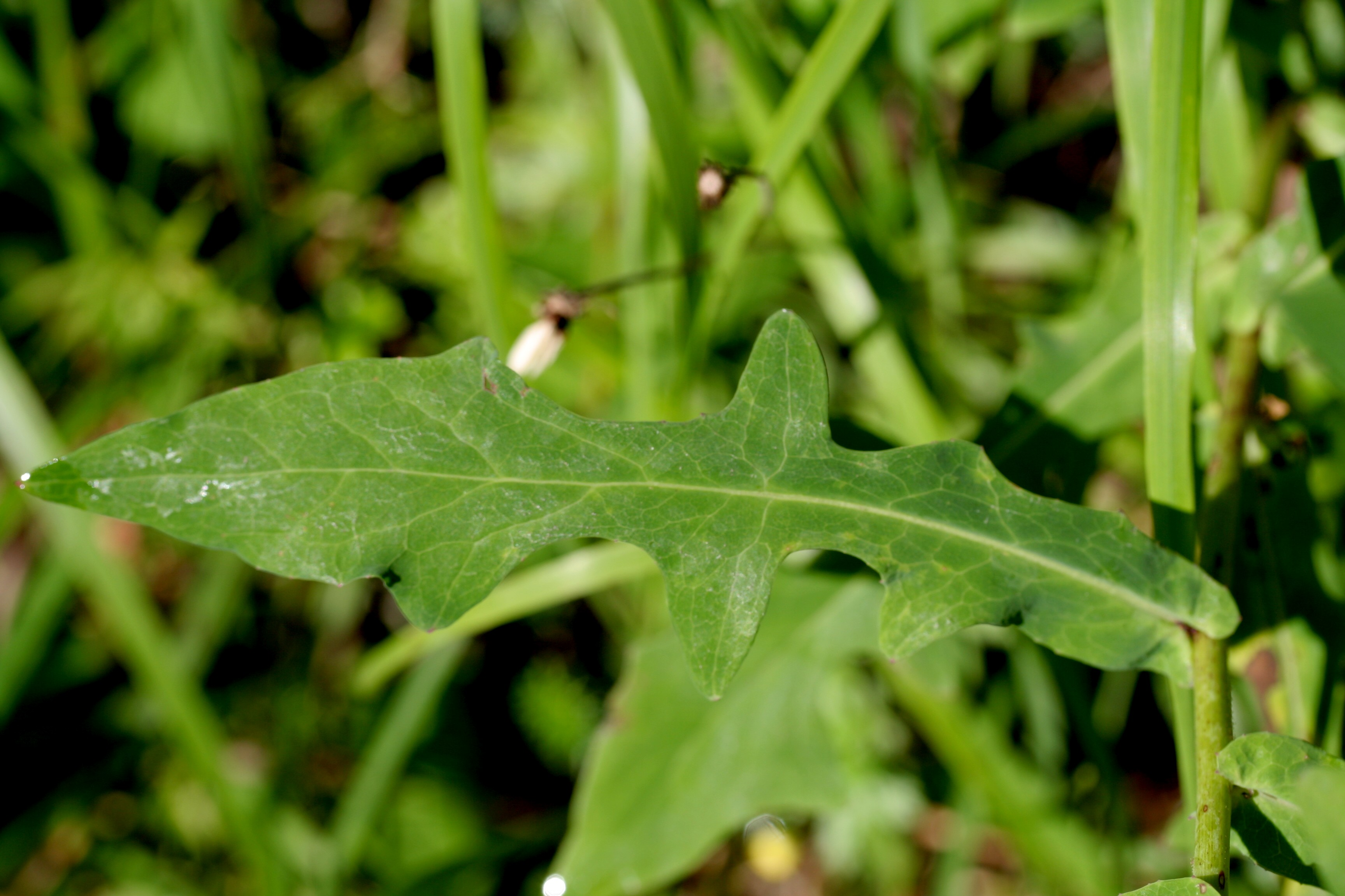 Prenanthes purpurea - Località: Cortina (BL), 1400 m s.l.m.